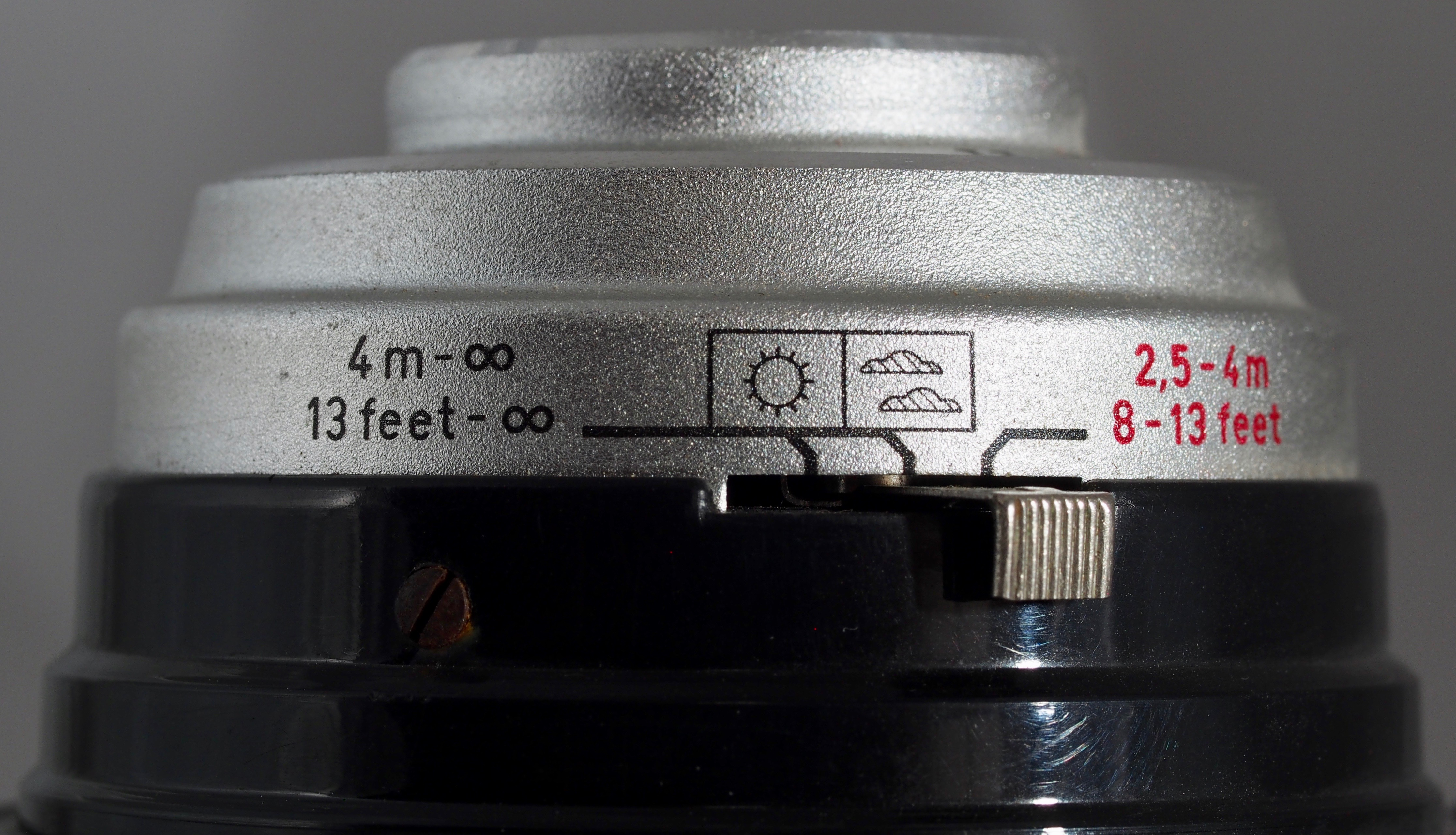 Click Blende 2 Symbole + Entfernung + Portraitlinse